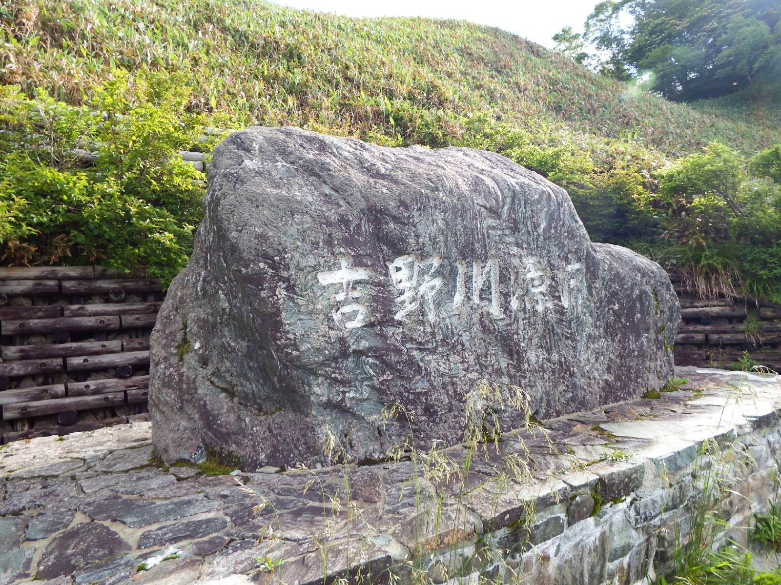 吉野川源流の碑